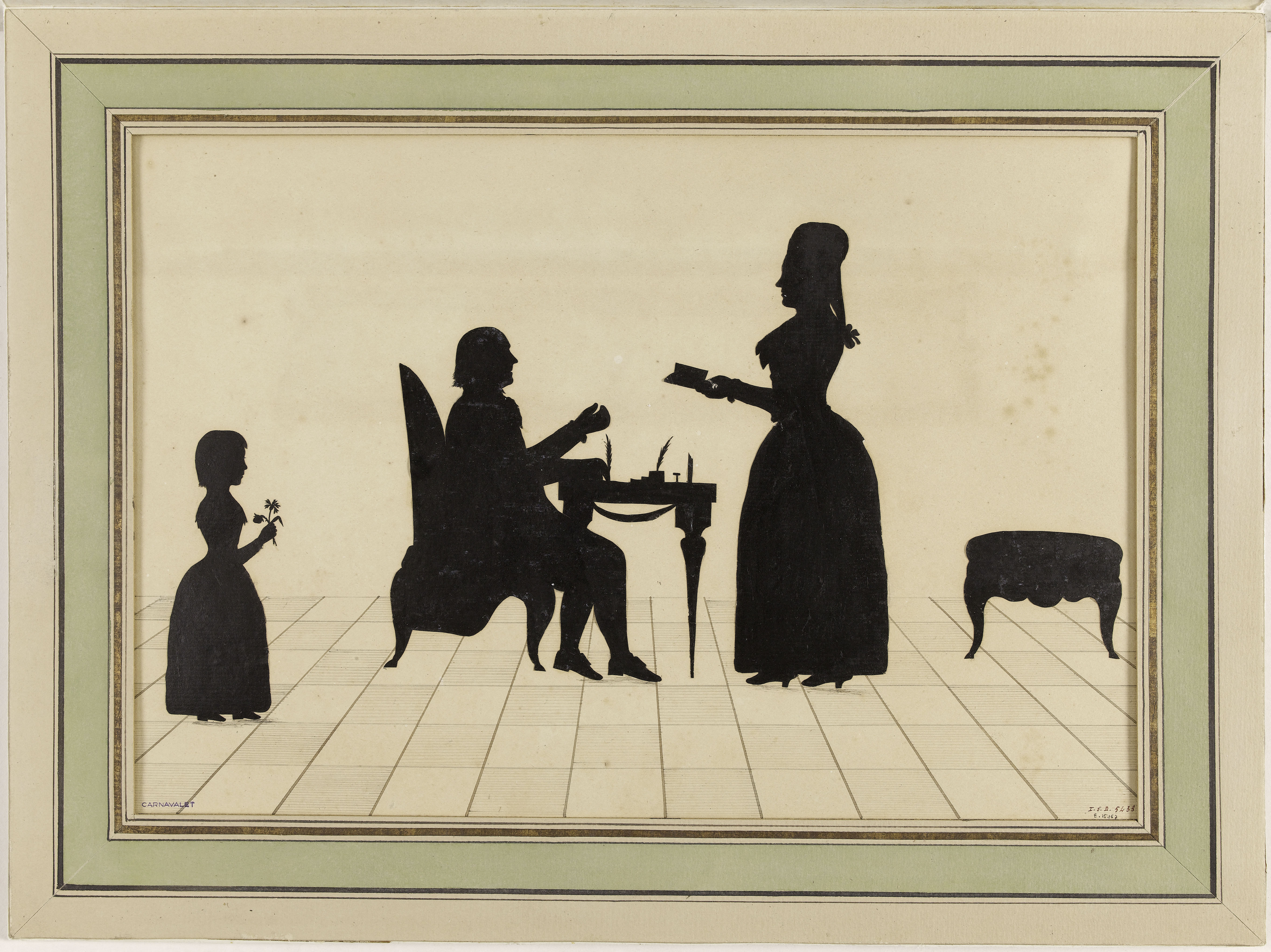 Silhouettes de Monsieur et de Madame Roland ainsi que de leur fille Eudora, dessinées par Johann Kaspar Lavater à Zurich.